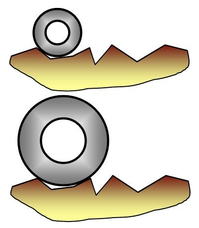 Influence de la taille d'une roue sur sa sensibilité aux aspérités du terrain. Schéma réalisé sous word.